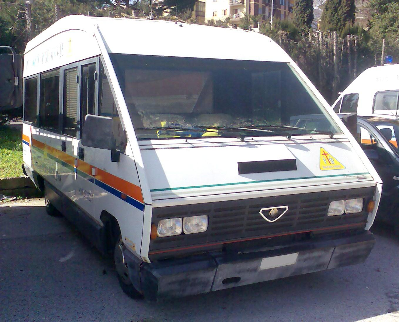 Alfa Romeo AR8 Ambulanza.